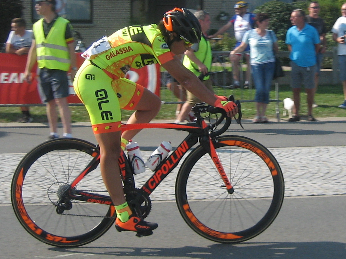 Finish van de 2e etappe van de Lotto Belgium Tour 2016 in Lierde.